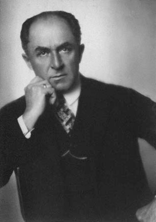 Foto Hugo Reichenberger, ca. 1925